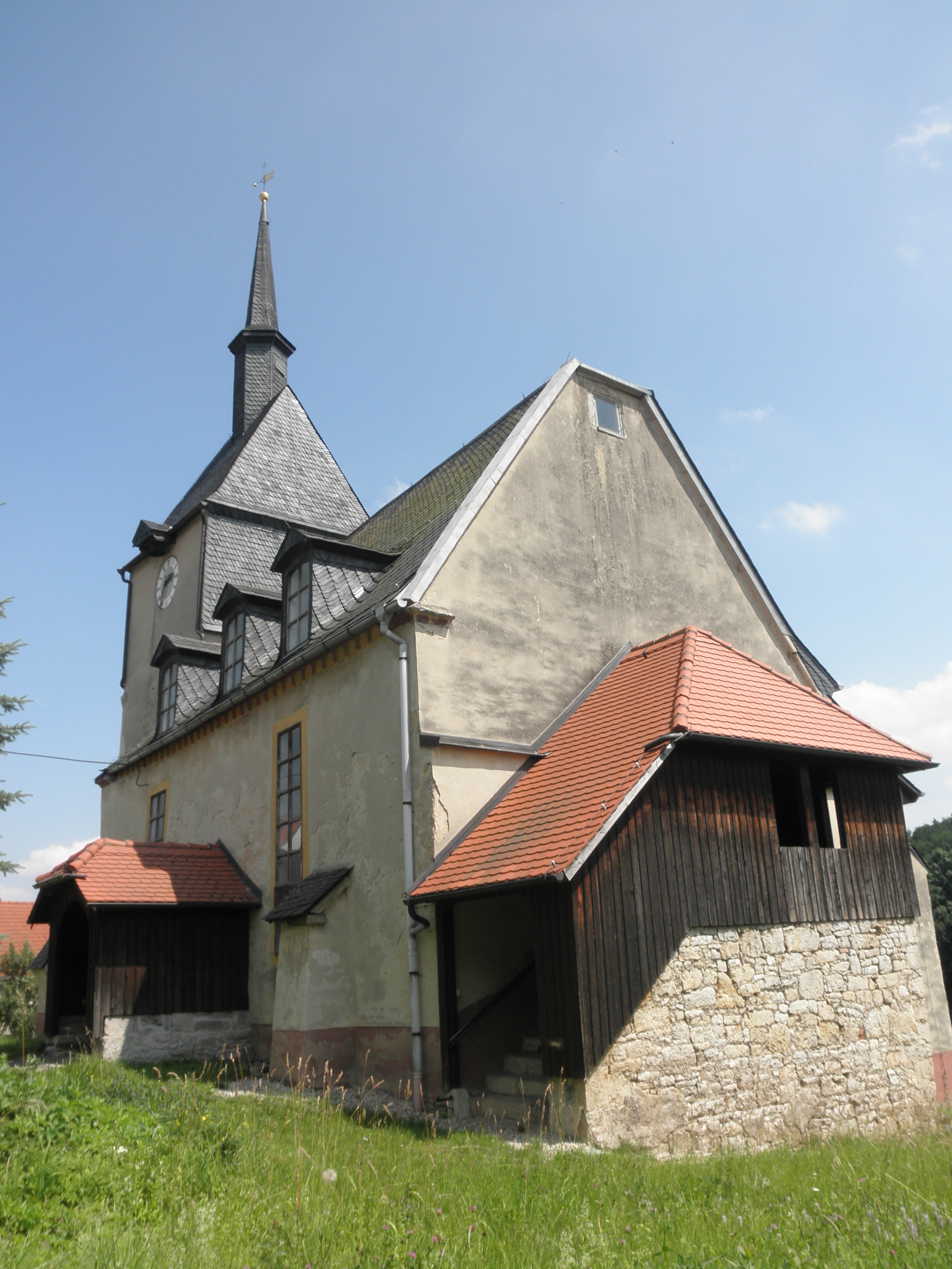 Church in Schmiedehausen in Thuringia